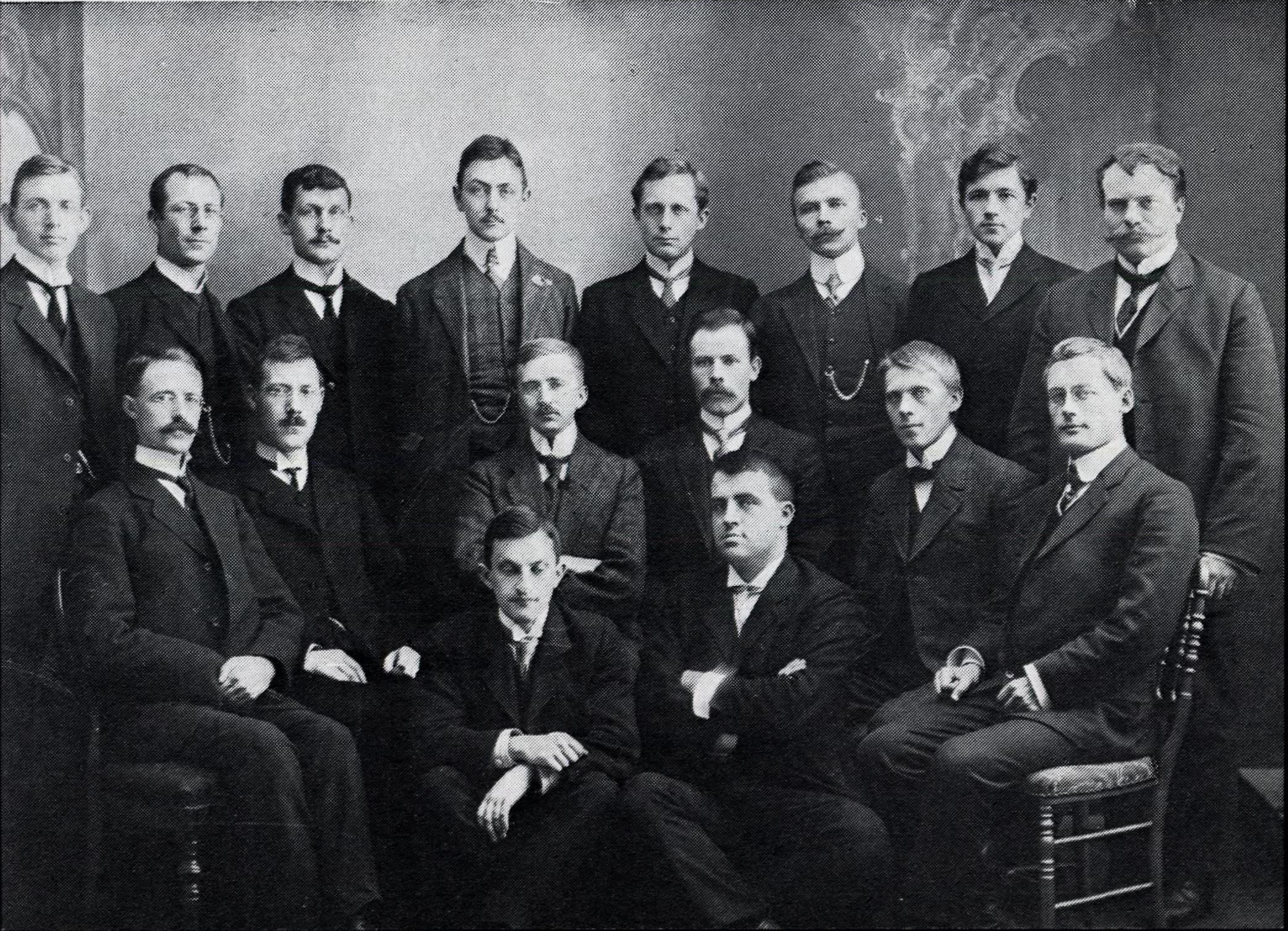 Diskusjonsforeningen «pønskarlaget». Stående fra venstre: Ola Raknes, Sigurd Kolsrud, Martin Fonstad, Francis Bull, Ånund Åmlid, Johannes Lillegraven. Andre rekke: Arne Bergsgård, Oluf Kolsrud, Fredrik Wexelsen, Knut Liestøl, Olav Midttun, Hans Kjæstad. Foran: Georg Sverdrup og Didrik Arup Seip